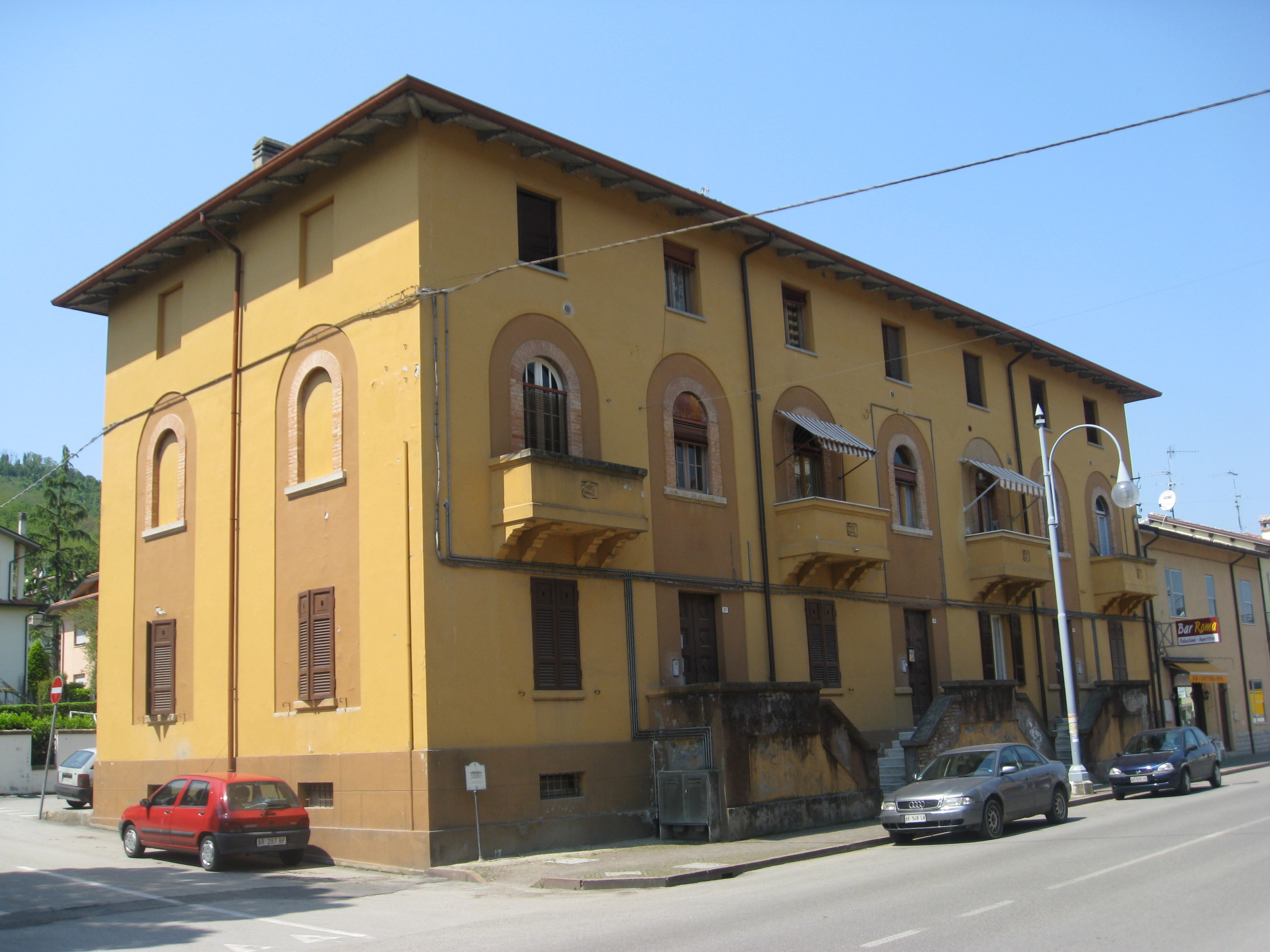 Casa Becker , foto propria a Predappio